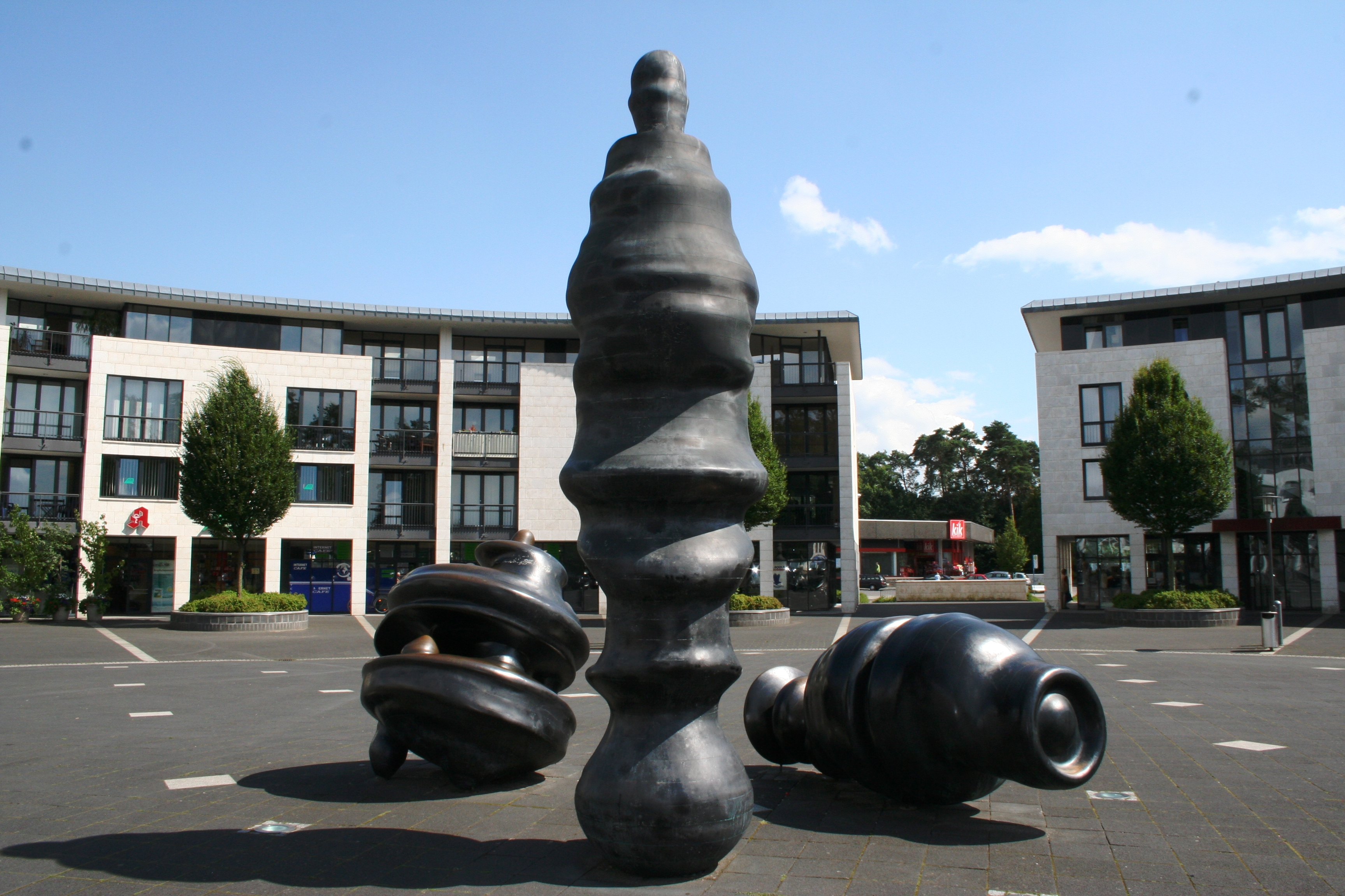 Skulptur „Auf der Lichtung“ von Anthony Cragg von 1997 auf dem Reichowplatz in Bielefeld Sennestadt